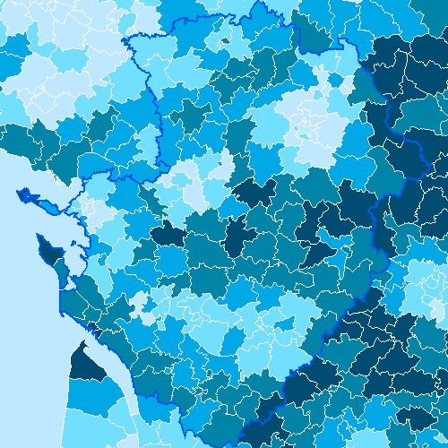 Image:60ansleg.png Part de la population ayant plus de 60 ans, au recensement de 1999, dans le Poitou-Charentes, par canton. Cette carte est généreusement fournie par l'IAAT (Institut atlantique d'aménagement du territoire) Je la place comme convenu avec eux sous licence GFDL